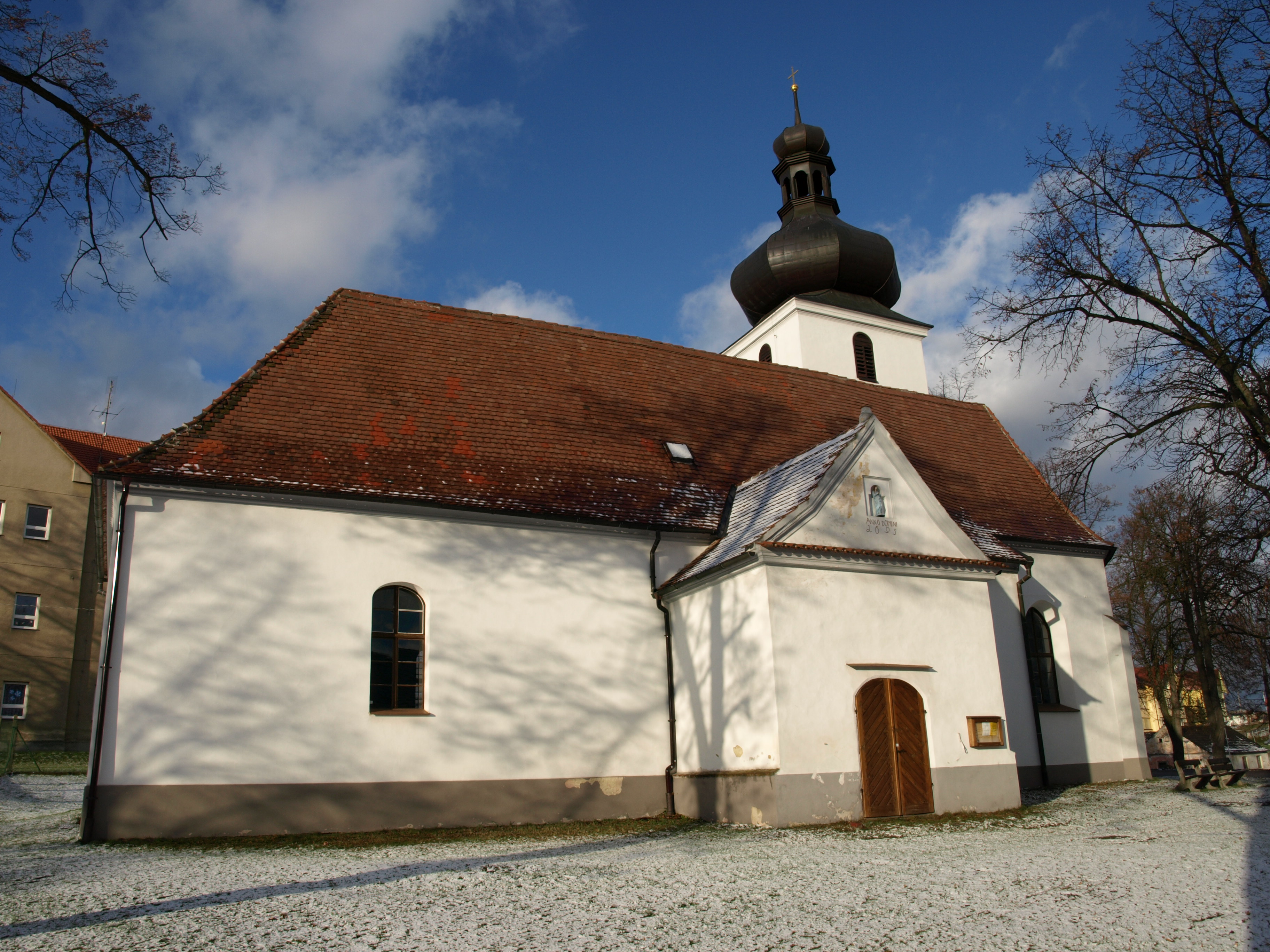 kostel Svatého Jakuba v Jílovicích